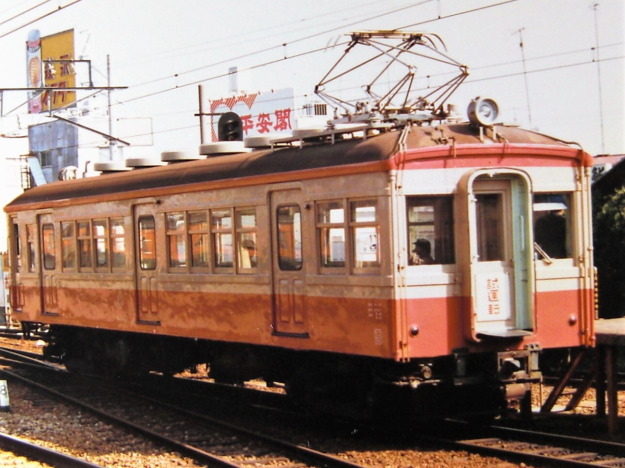 伊豆箱根鉄道モハ66 1986年 小田原駅撮影